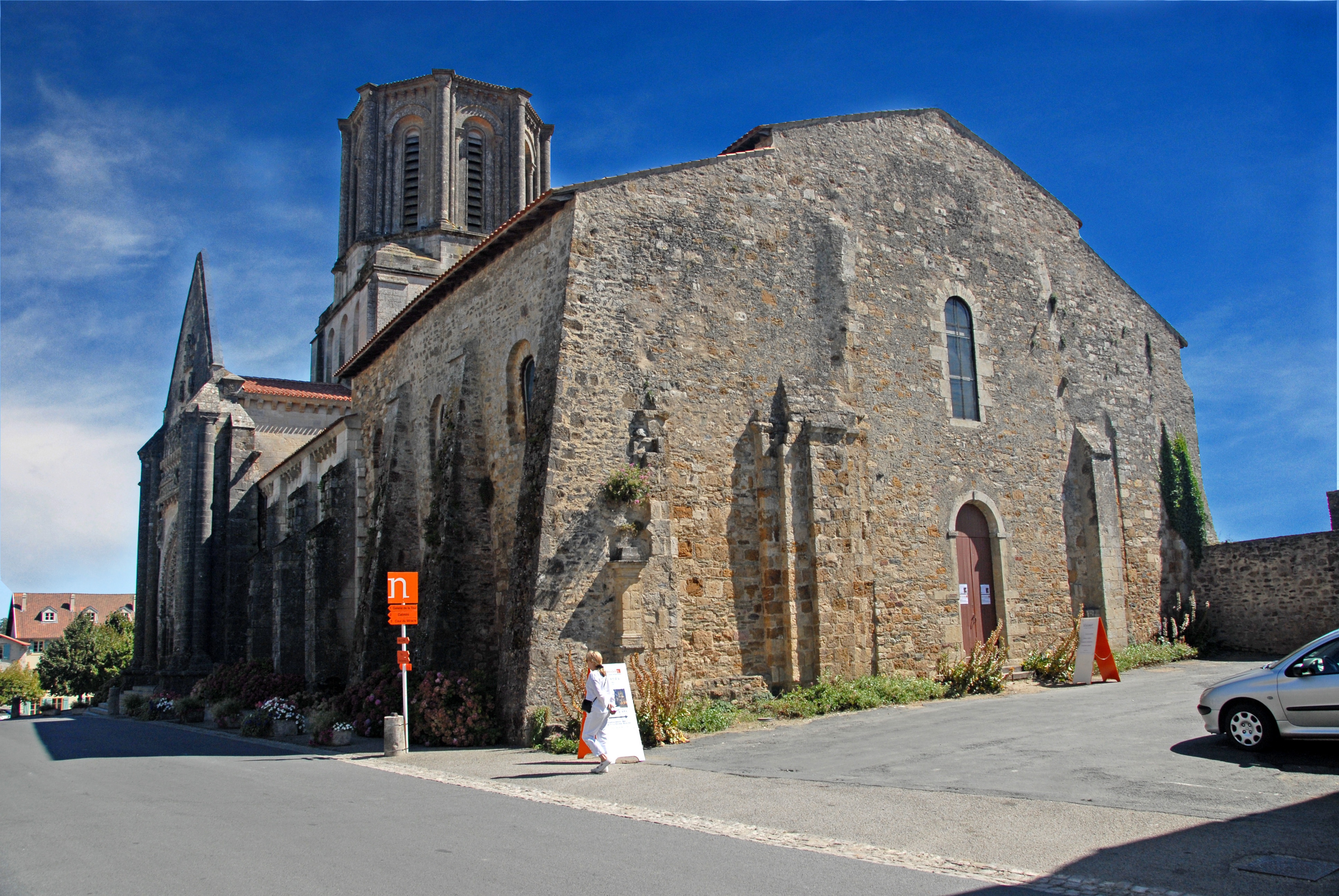 Vouvant, romanische Kirche, Ansicht von NW